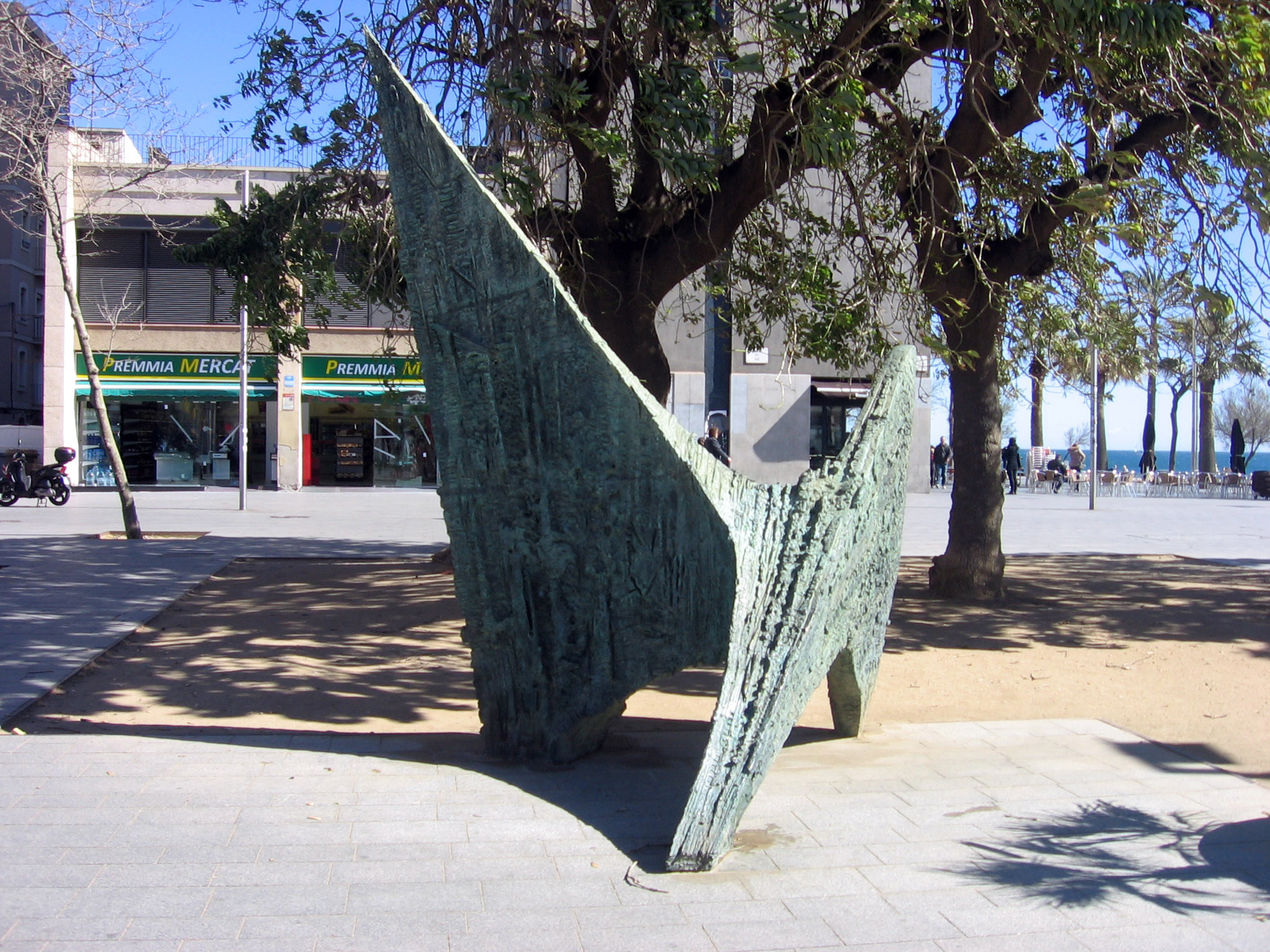 Evocación marinera (1960), de Josep Maria Subirachs, Barcelona.